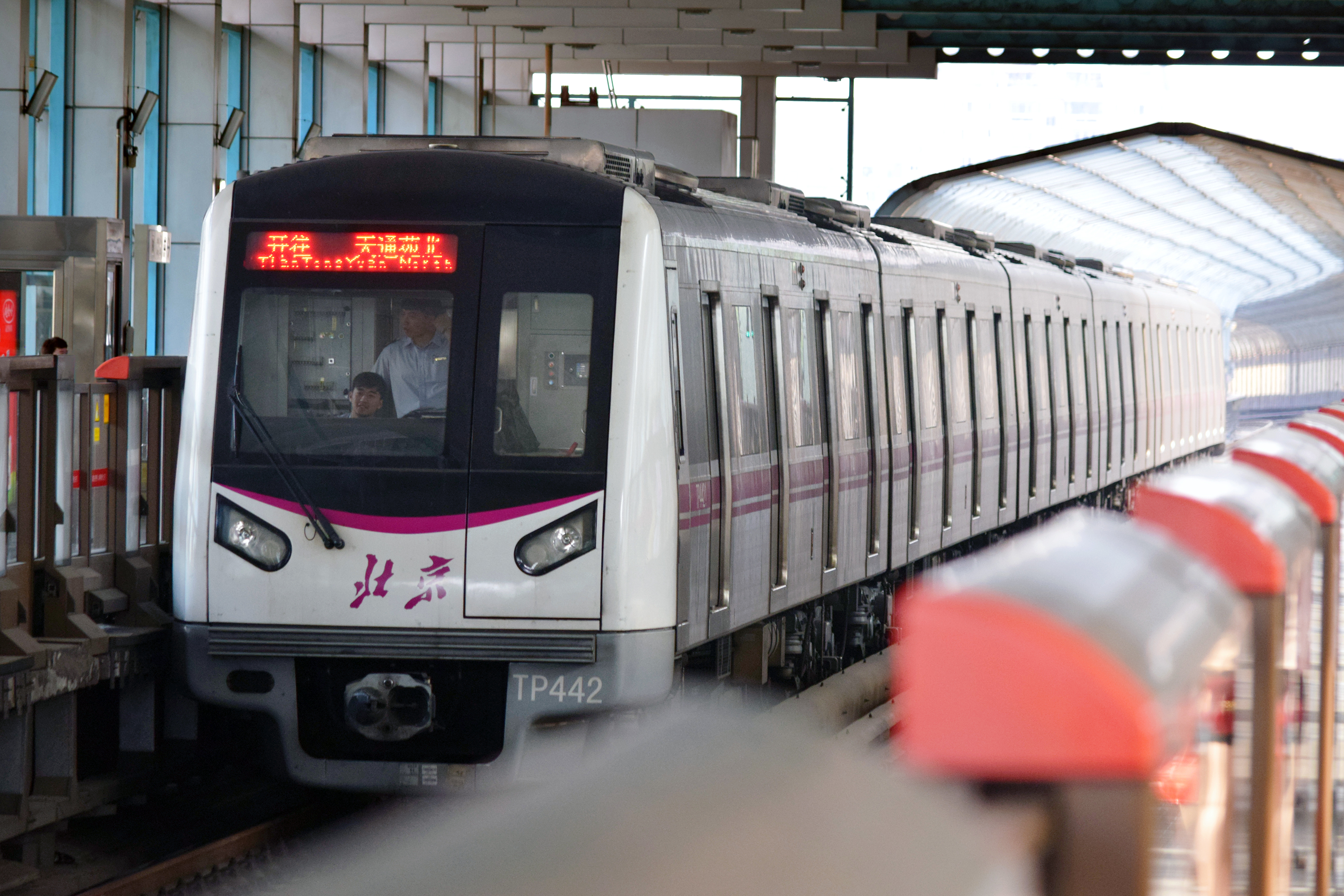 中文（中国大陆）: TP442号车驶入天通苑站。